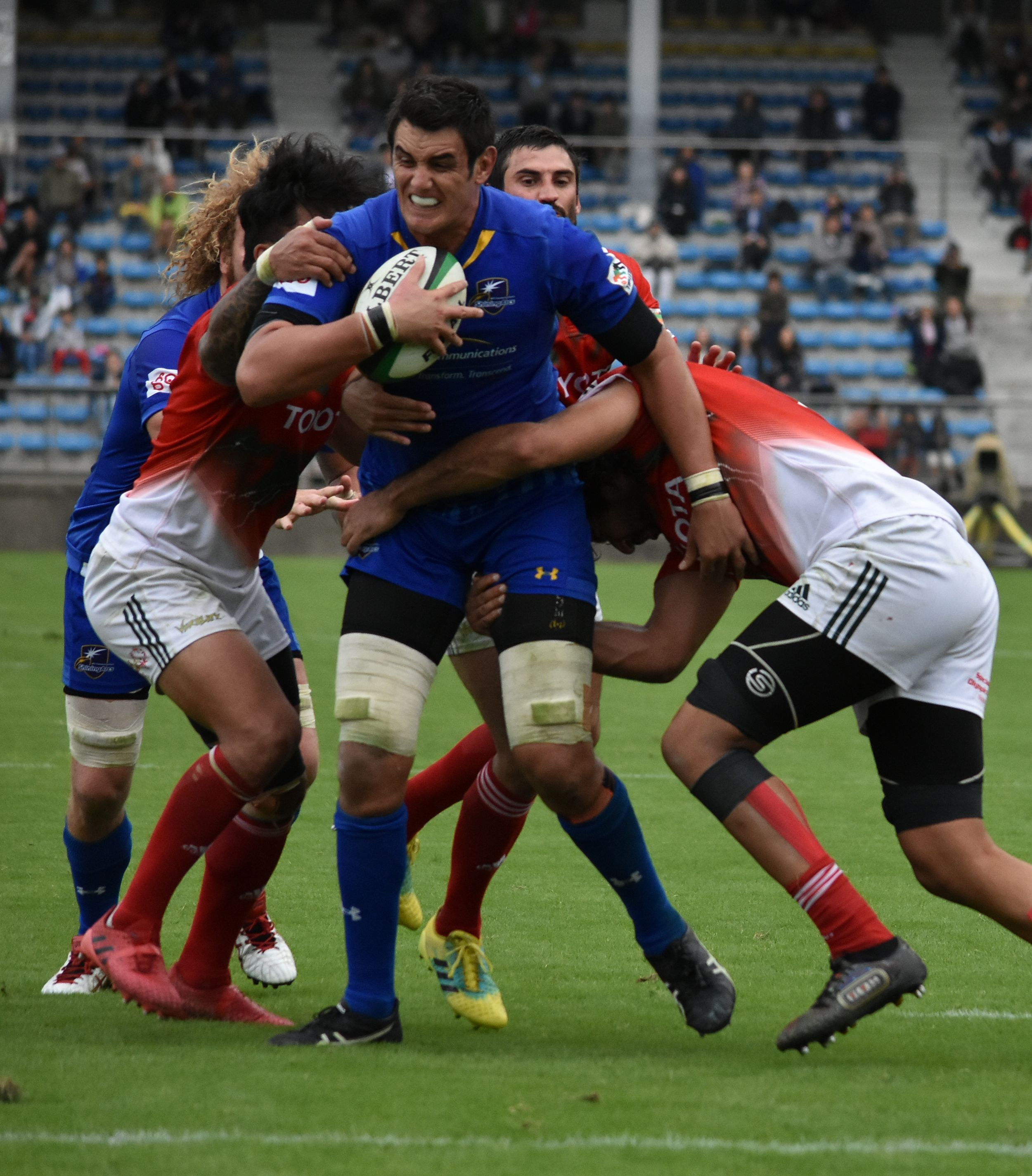 アイザック・ロス